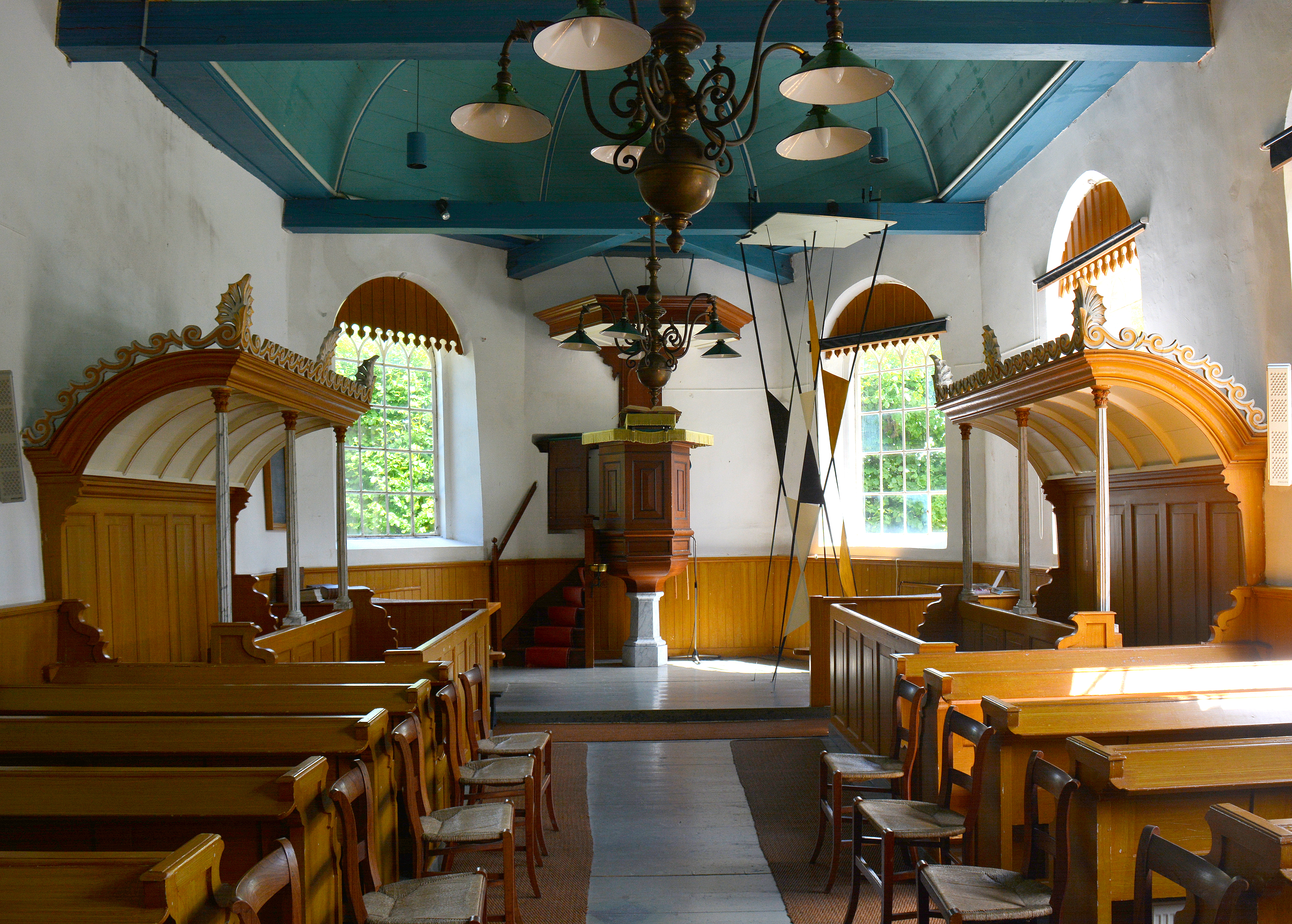 Mariakerk, Blessum, interieur oostelijke richting